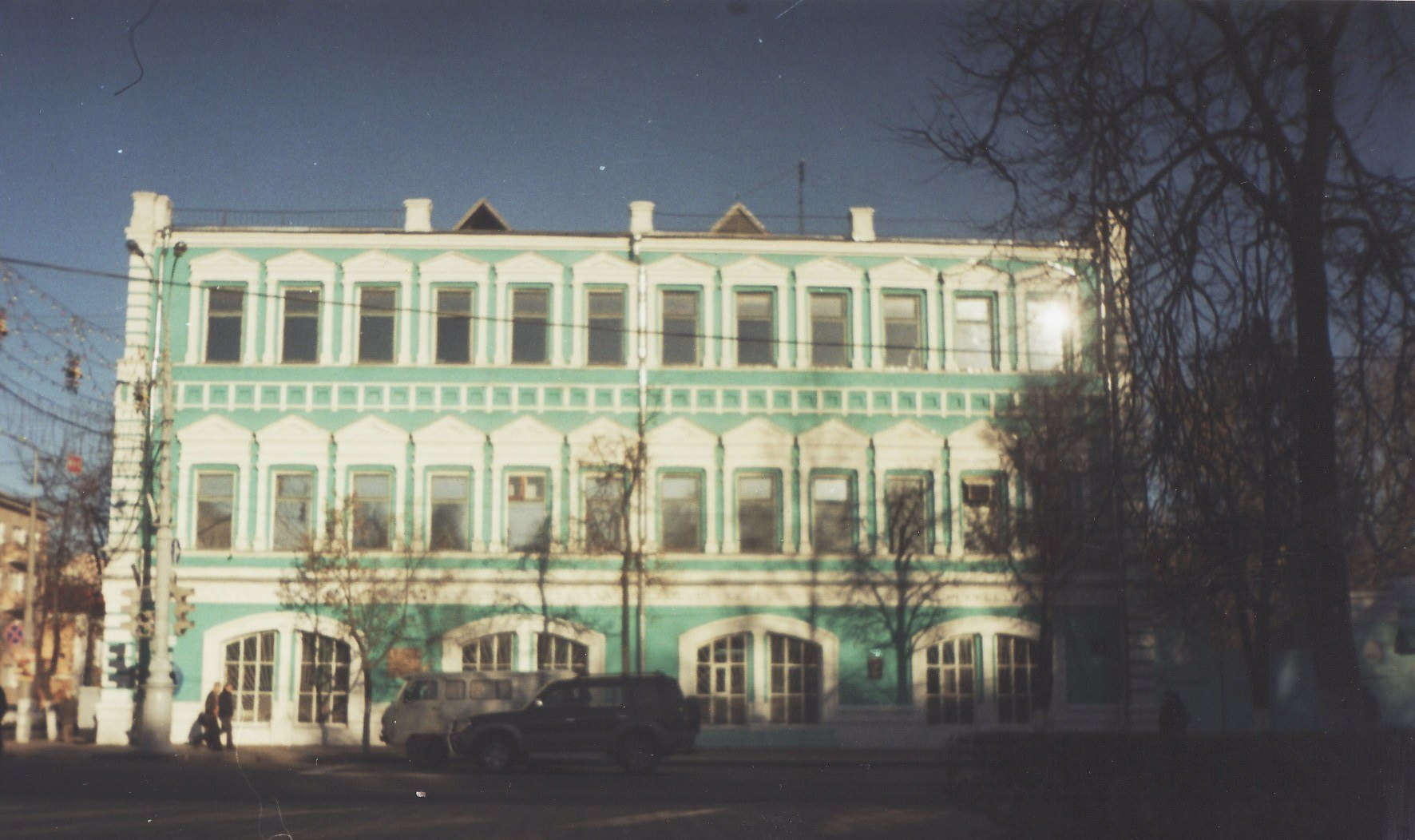 г. Гомель, Советская 1 Полеспечать